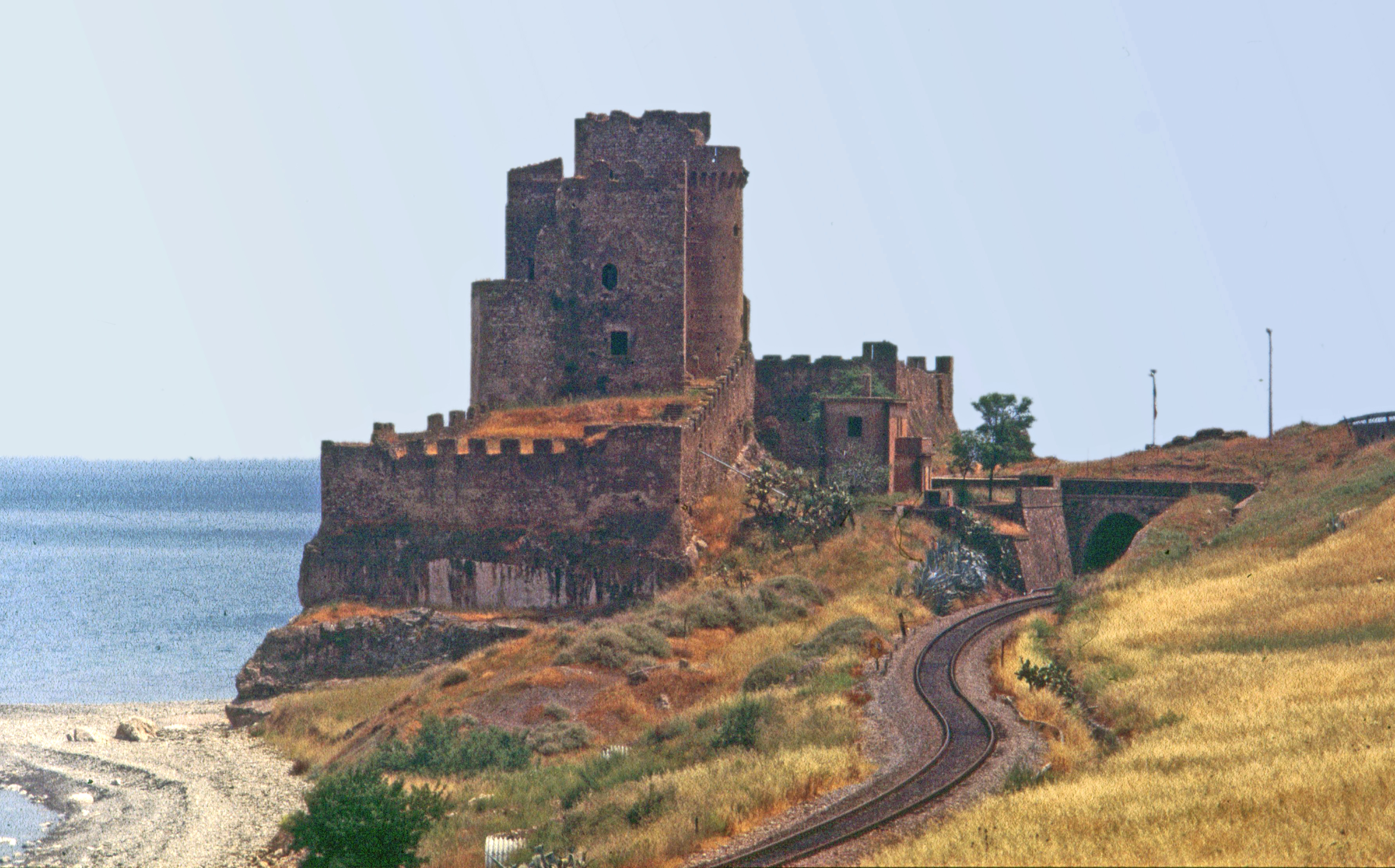 Roseto Capo Spulico, Castello della Pietra